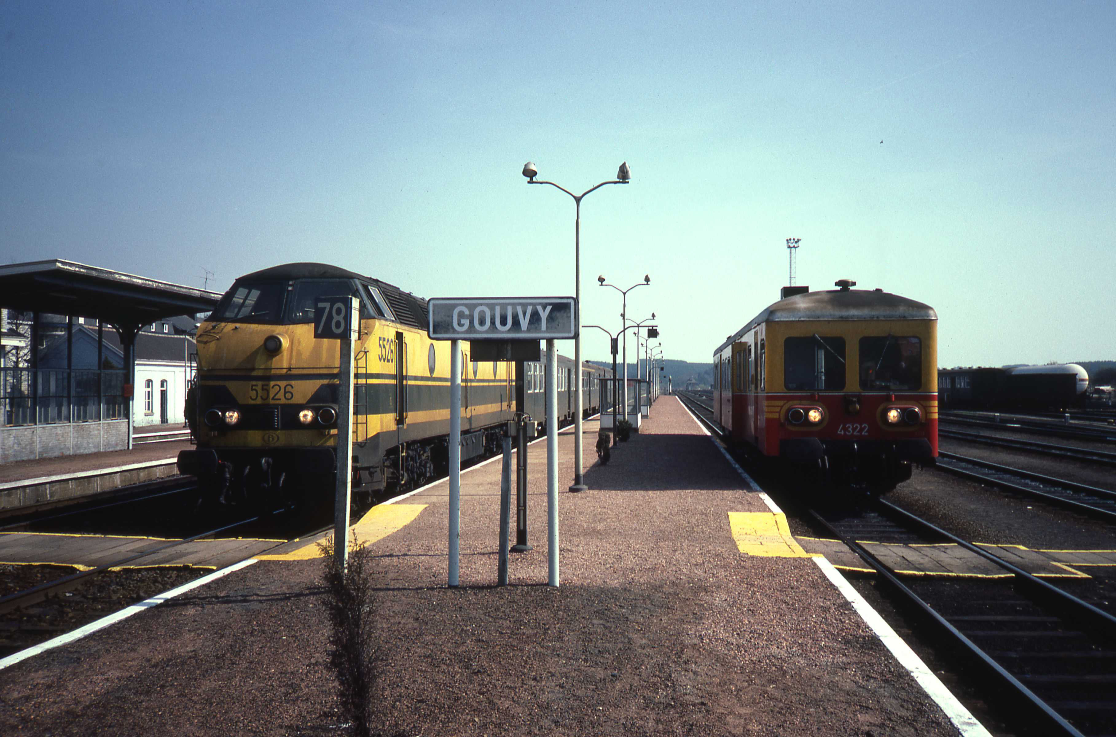 Motorwagen 4322 vanuit Libramont met spoorlijn 163 in april 1984 geeft hier aansluiting met de trein uit Luxemburg. Dit is een paar maanden voor de opheffing van deze spoorlijn vanaf Bastenaken. De spoorlijn 42 is nog niet geëlektrificeerd.